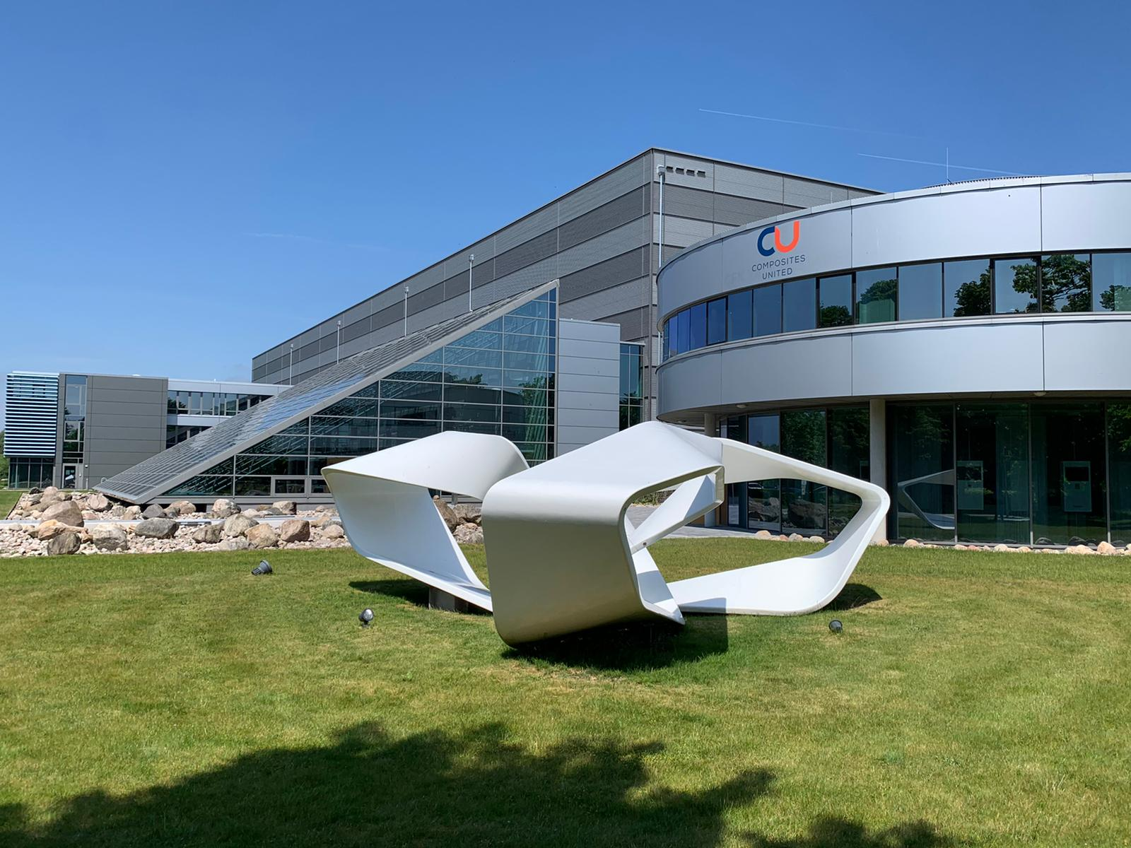 Foto CU Stade